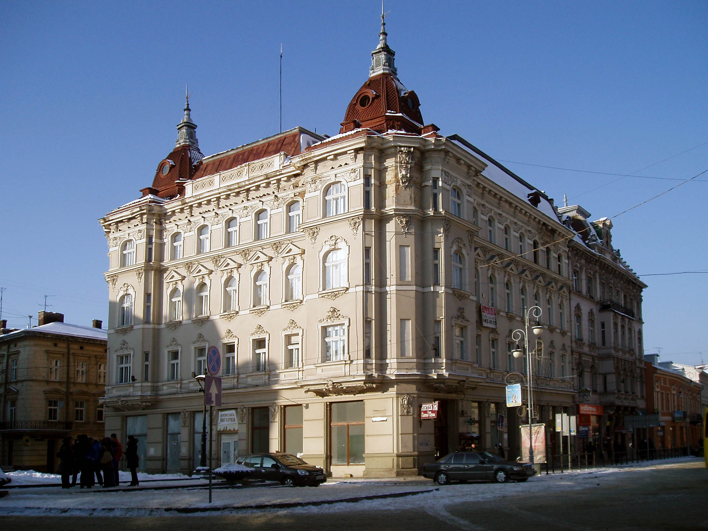 Будинок № 28 на проспекті Шевченка у Львові. Архітектор Яків Баллабан (1898).